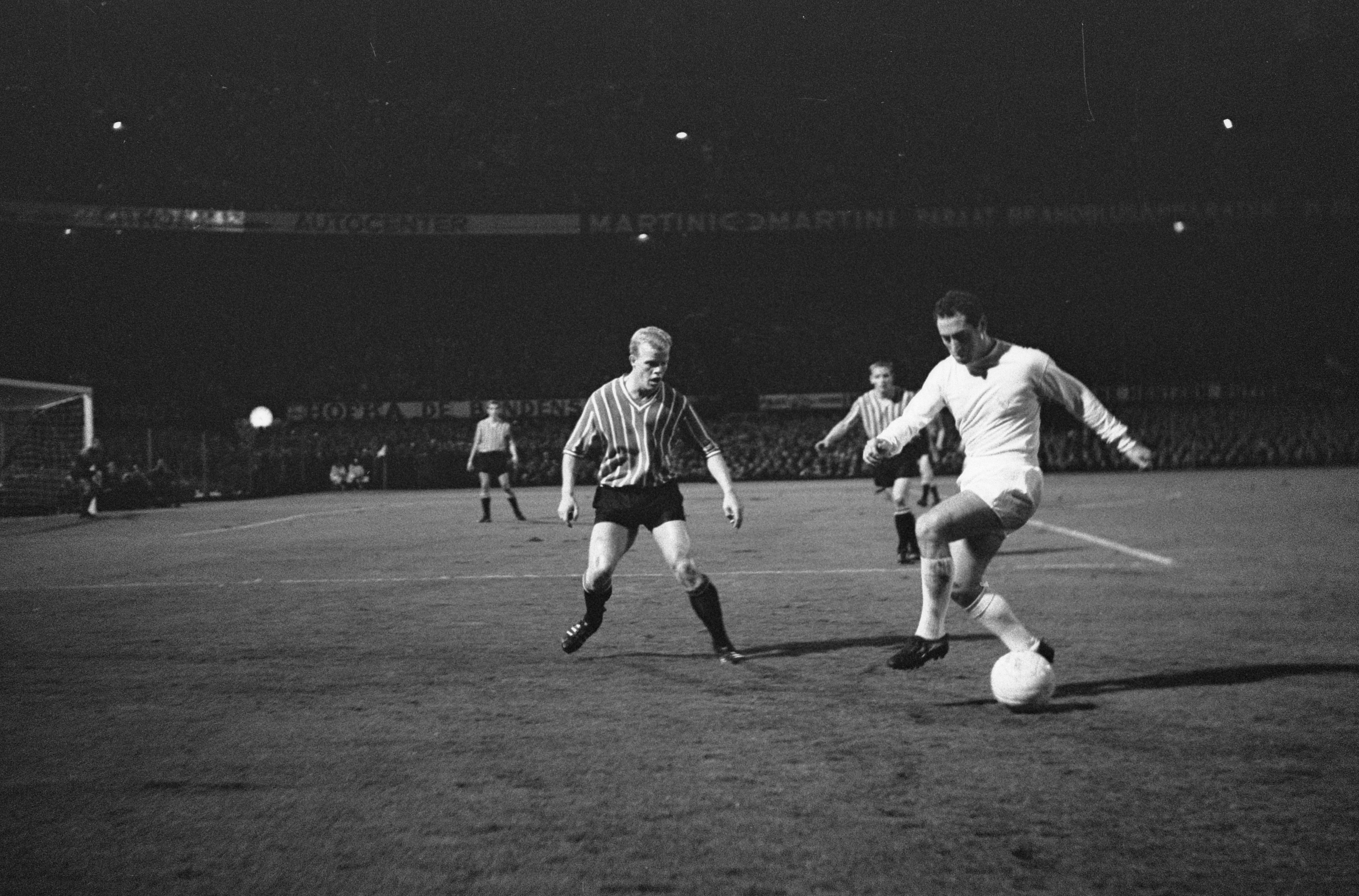 Collectie / Archief : Fotocollectie Anefo Reportage / Serie : [ onbekend ] Beschrijving : Feyenoord tegen Real Madrid 2-1, spelmomenten Datum : 8 september 1965 Trefwoorden : sport, voetbal Instellingsnaam : Feyenoord, Real Madrid Fotograaf : Nijs, Jac. de / Anefo Auteursrechthebbende : Nationaal Archief Materiaalsoort : Negatief (zwart/wit) Nummer archiefinventaris : bekijk toegang 2.24.01.05 Bestanddeelnummer : 918-1565